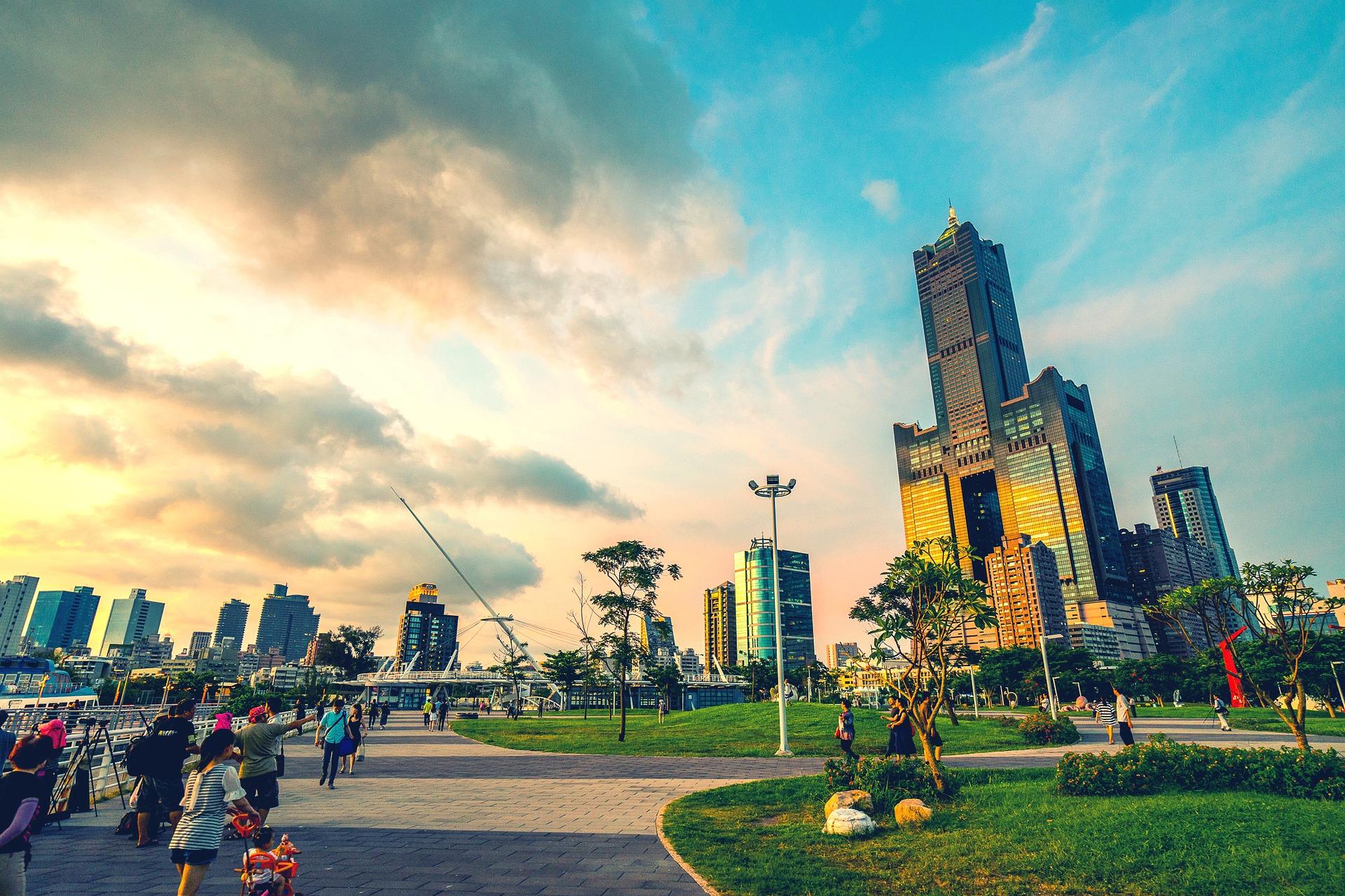 高雄85大樓 黃昏